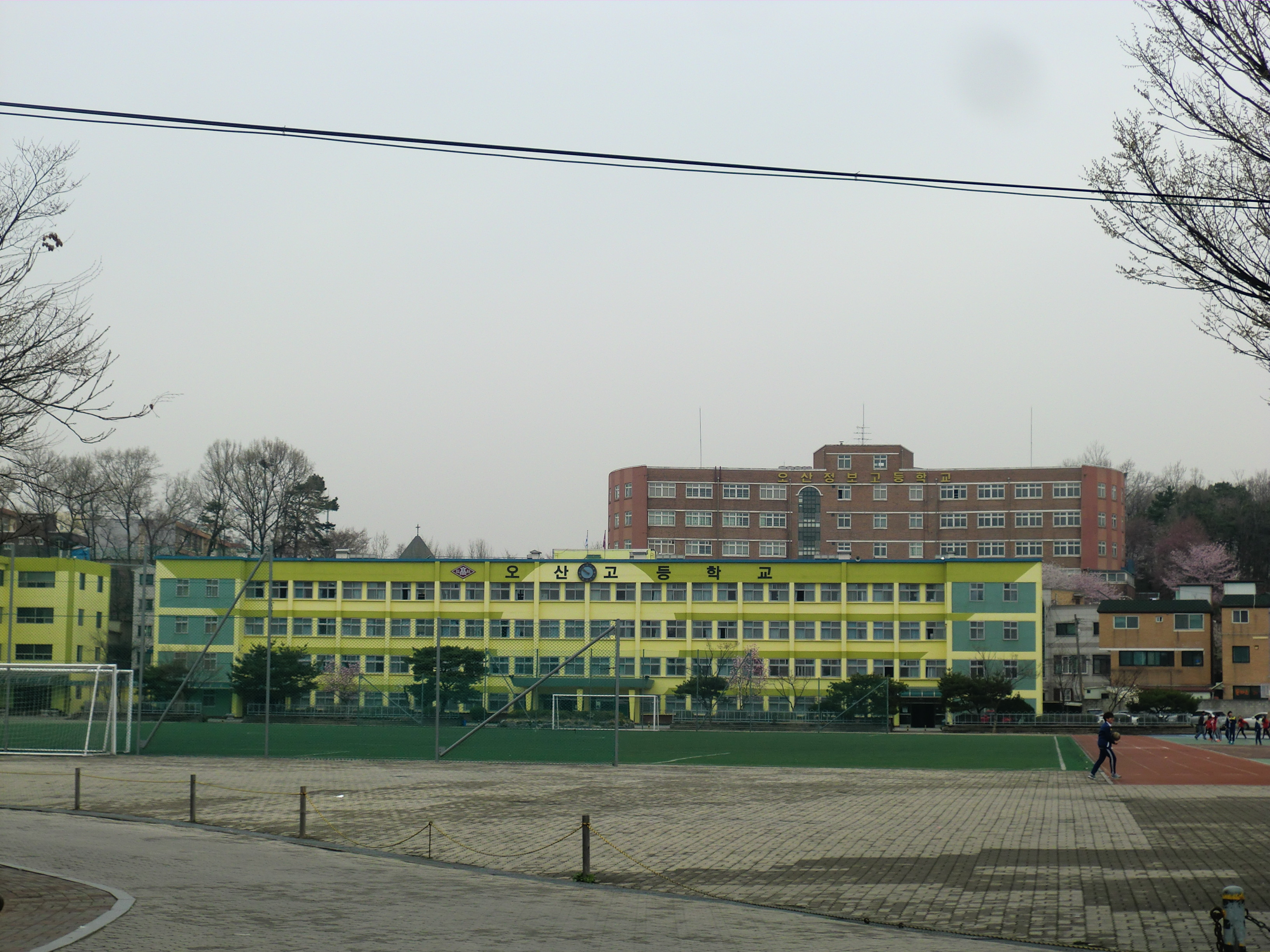 경기도 오산시에 있는 오산고등학교 (앞)와 오산정보고등학교